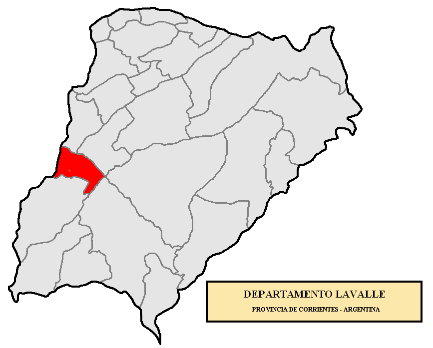 Localización del Departamento Lavalle en la provincia de Corrientes, Argentina Localización del Departamento Lavalle, en la provincia de Corrientes, Argentina.